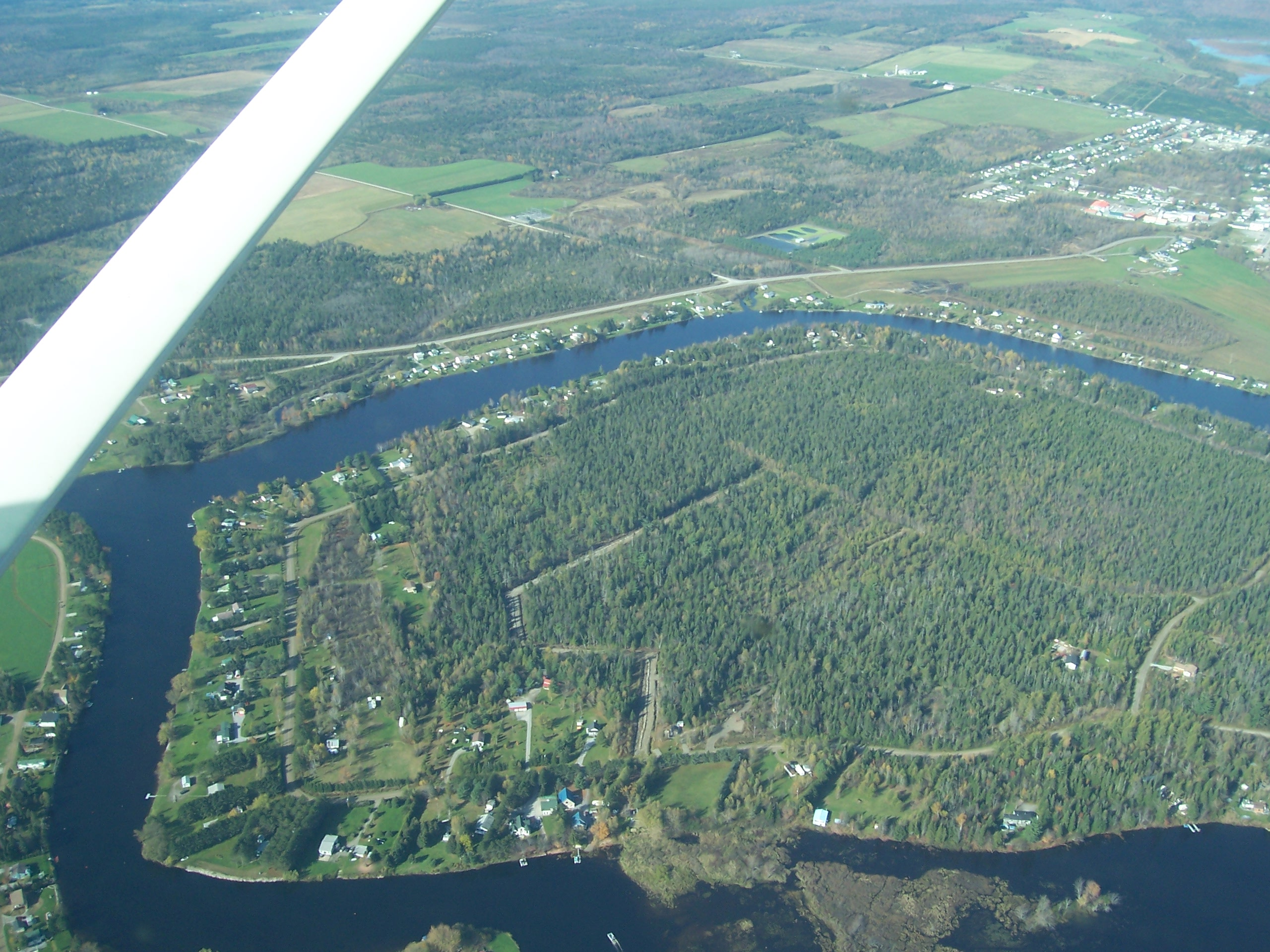 Rivière St-Francois en haut et rivière aux Saumons en bas Weedon 08-10-2006.jpg